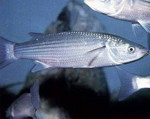 Picture of Liza ramado